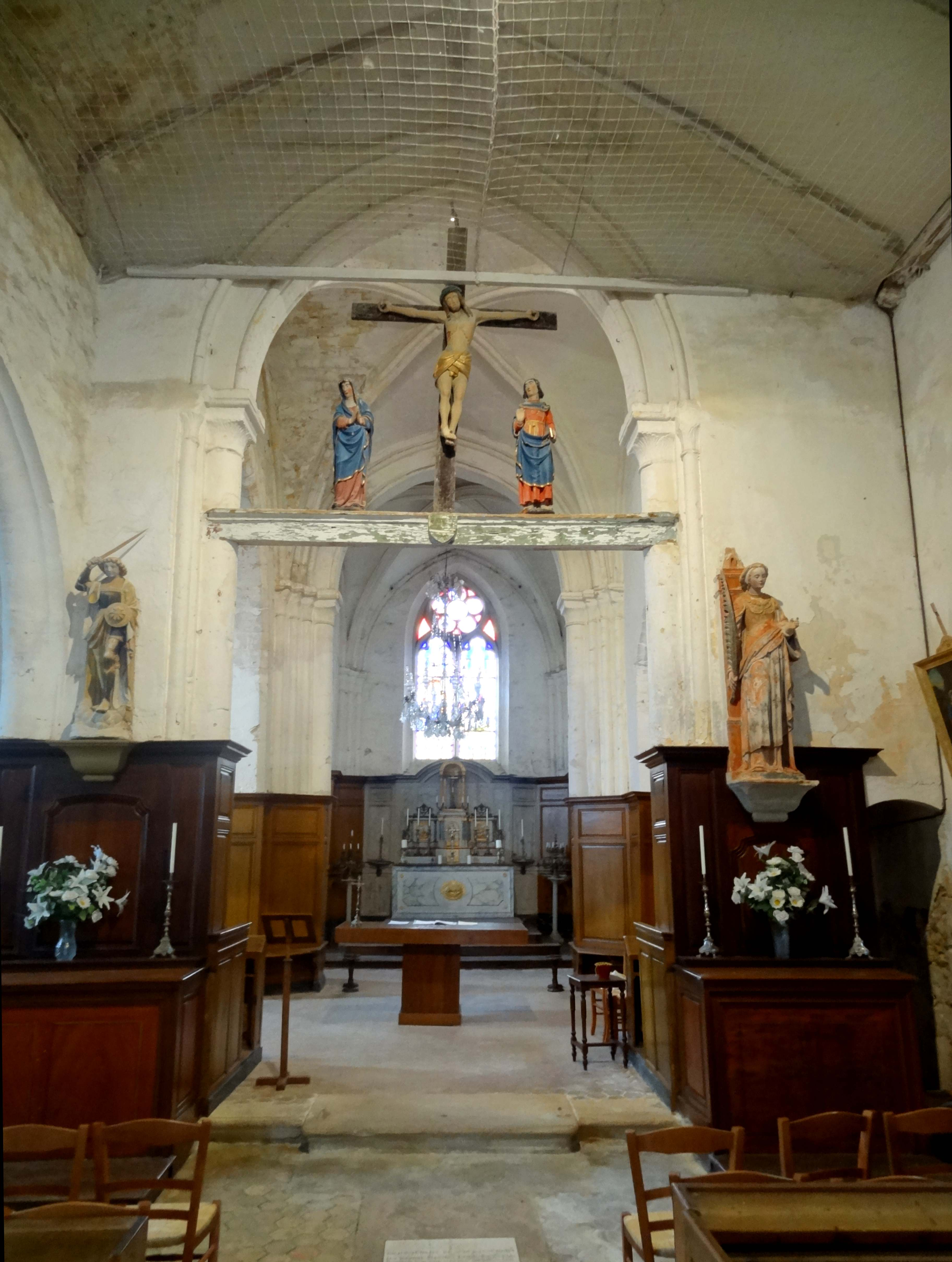 Intérieur de l'église - voir titre.